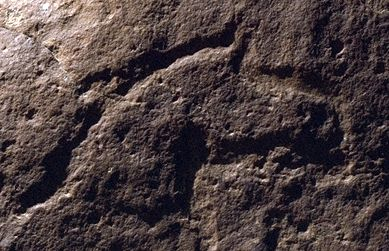 Pequeña cabeza de caballo grabada en la roca arenisca perteneciente al conjunto de la Cueva del Moro (Tarifa).